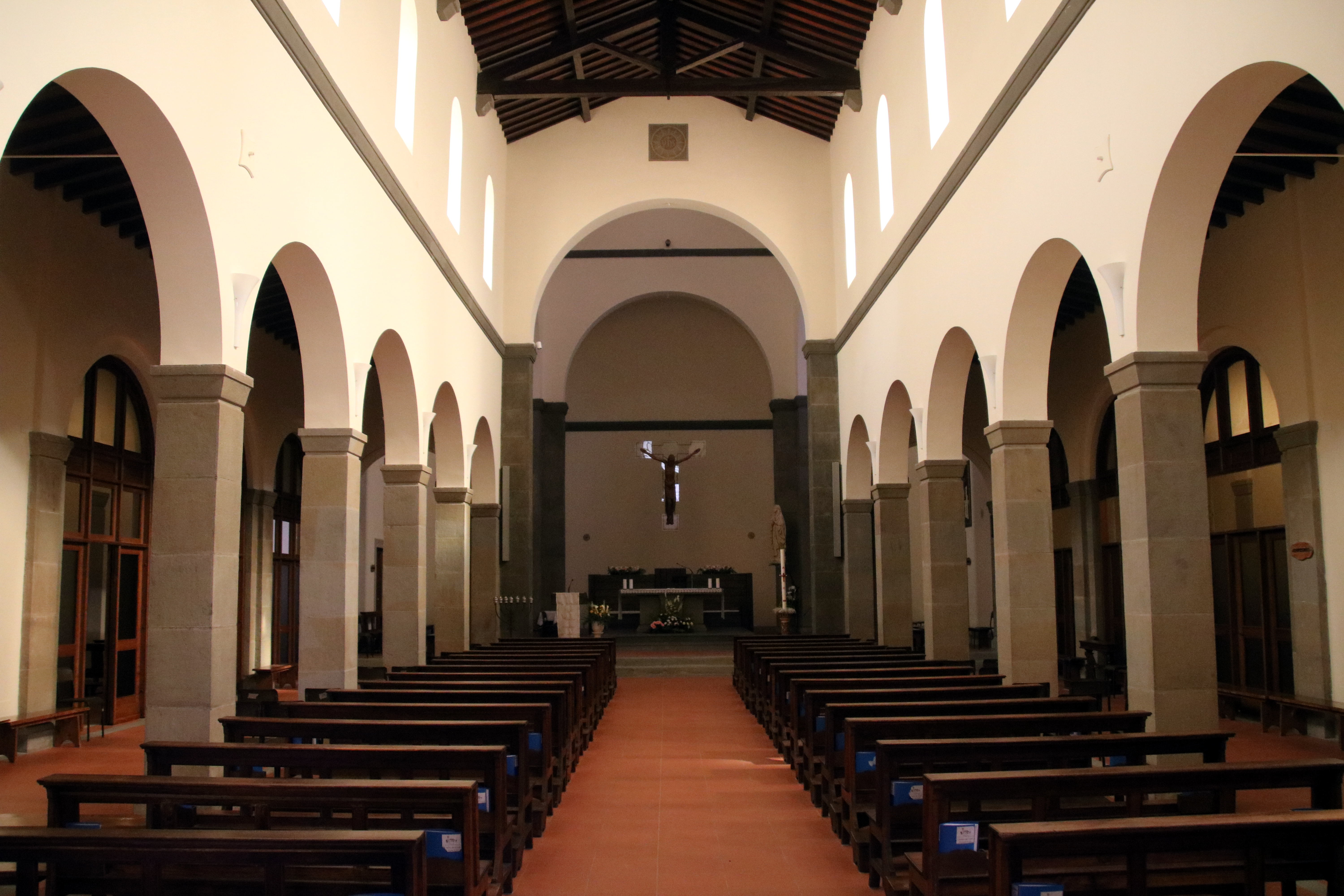 Chiesa di Santa Maria Immacolata (Rignano sull'Arno)